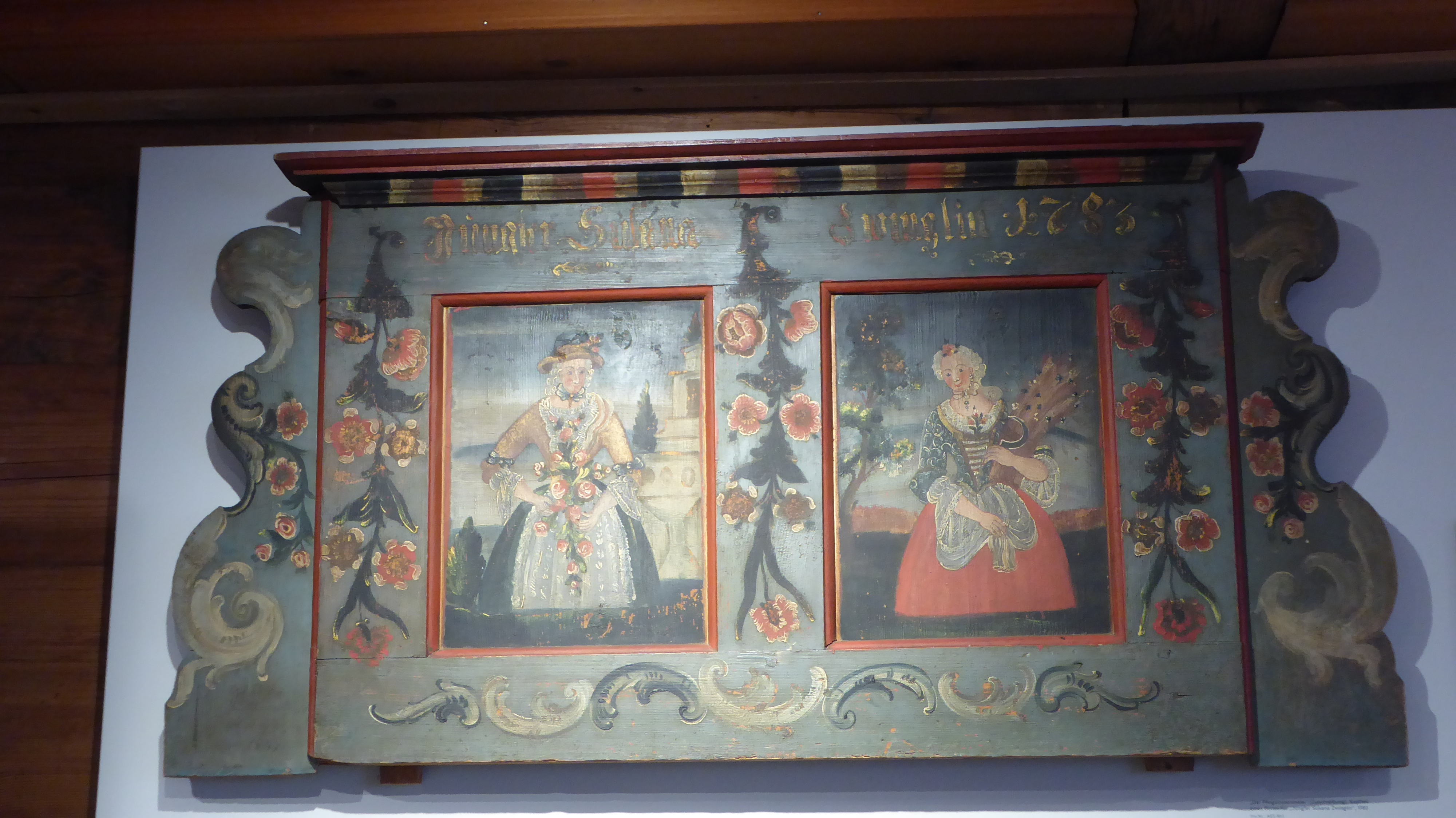 Dieses Betthaupt präsentiert im Museum Ackerhus den Pfingstrosenmaler. Dieser Notnamen bezeichnet einen Möbelmaler, der immer irgendwo eine Pfingstrose verwendet. Die Füllungen zeigen die beiden Jahreszeiten Frühling und Sommer in Gestalt zweier Damen. Als Vorlage diente ein Kupferstich von Rosalba Carriera.